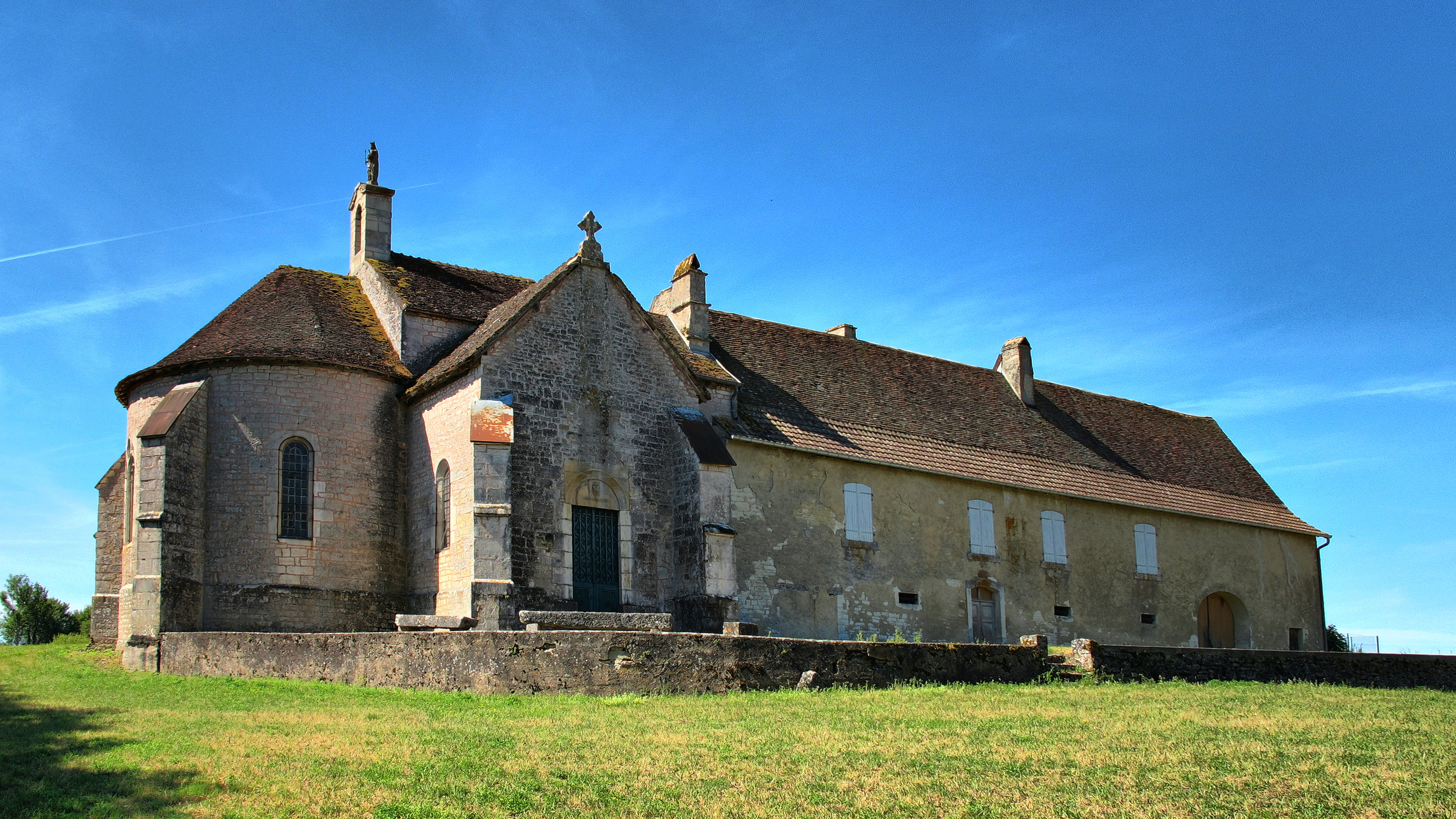 Chapelle Notre-Dame de Leffond .